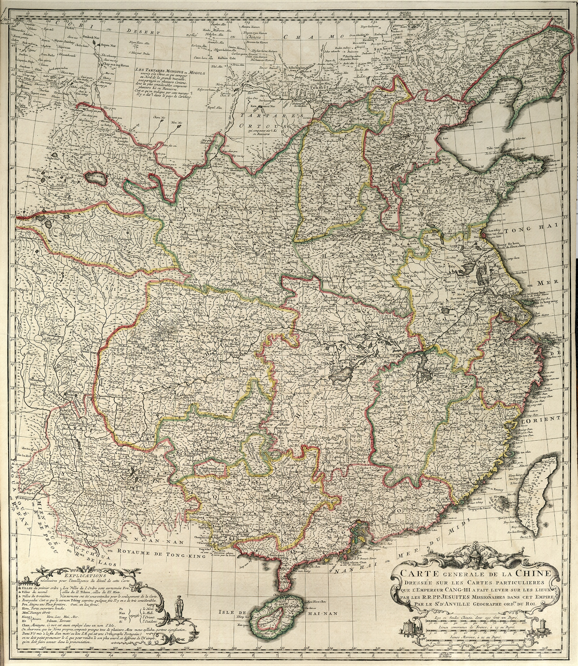 Nouvel atlas de la Chine, de la Tartarie chinoise, et du Thibet La Haye 1737. Carte générale d'assemblage.